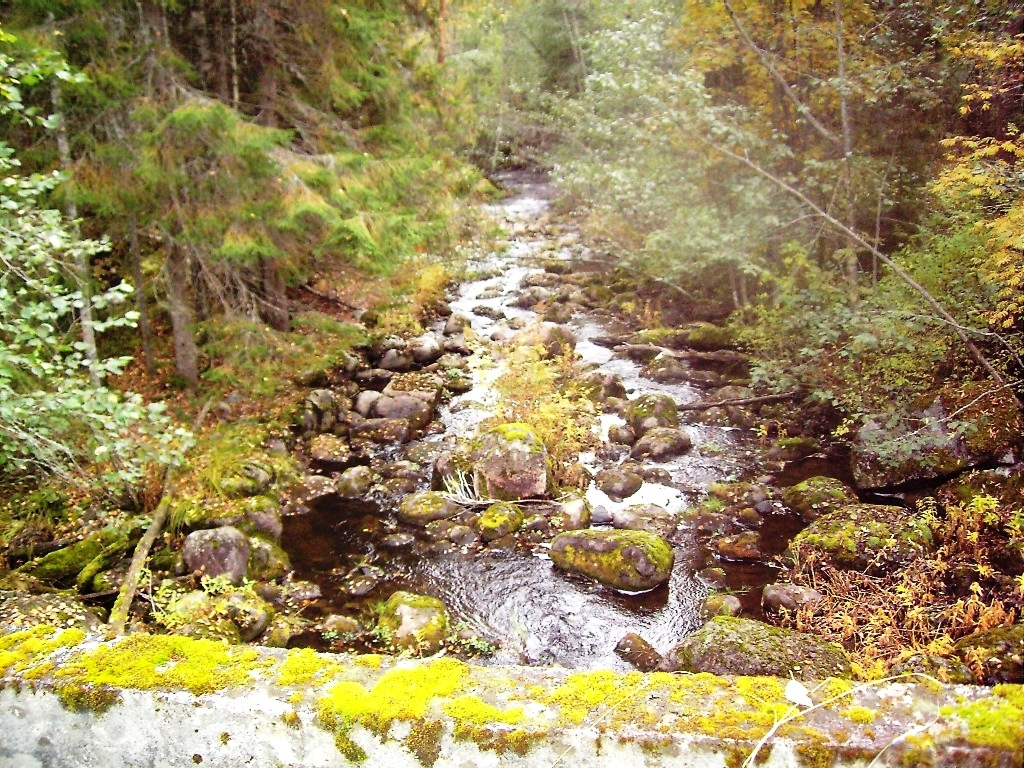 Ilmenjoki river